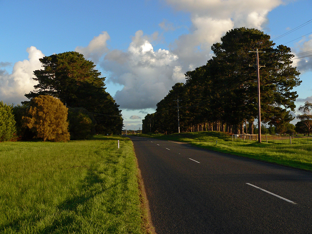 Windbreaks